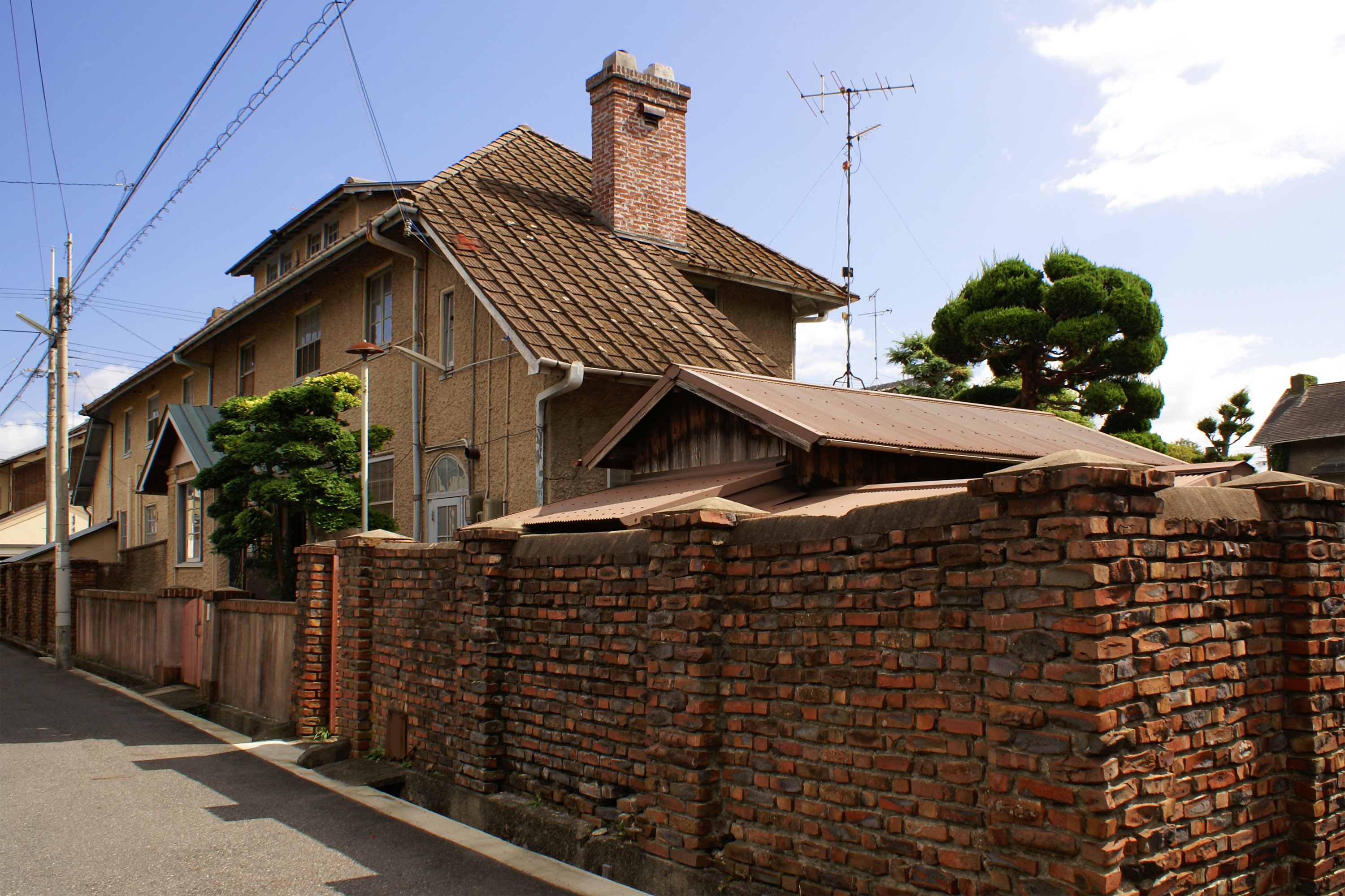 Ikeda-cho in Omihachiman, Shiga, Japan